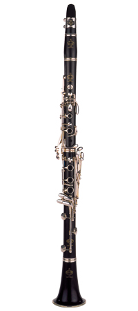 кларнет